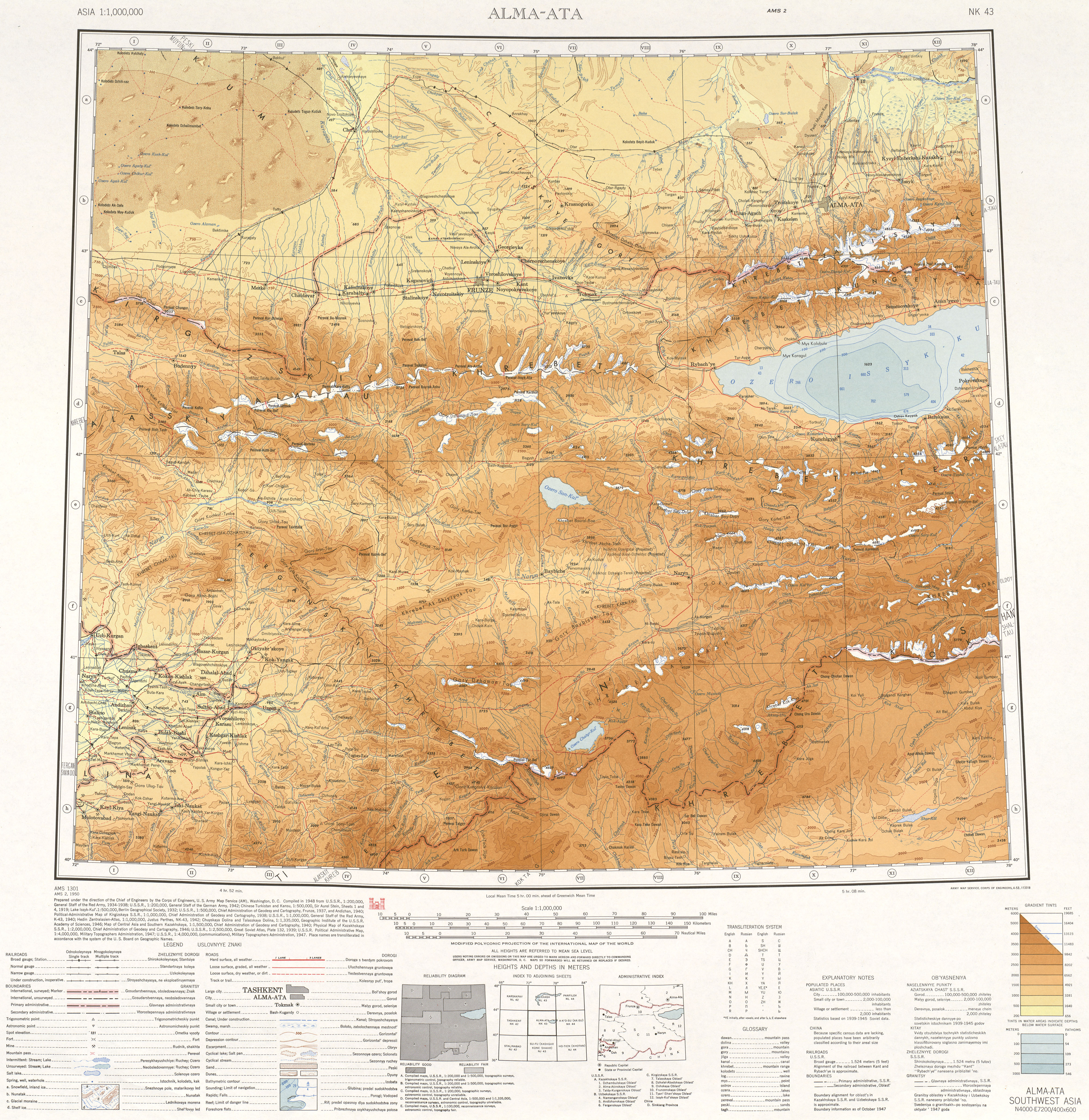 Alma-Ata NK-43 (1948)